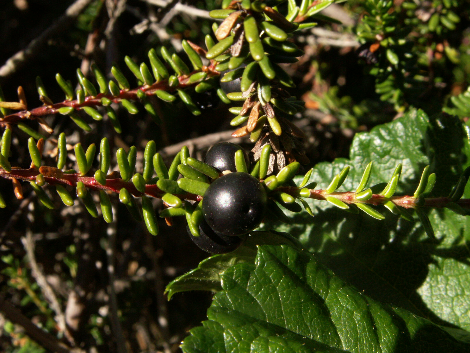 Empetrum nigrum, Hochmoor